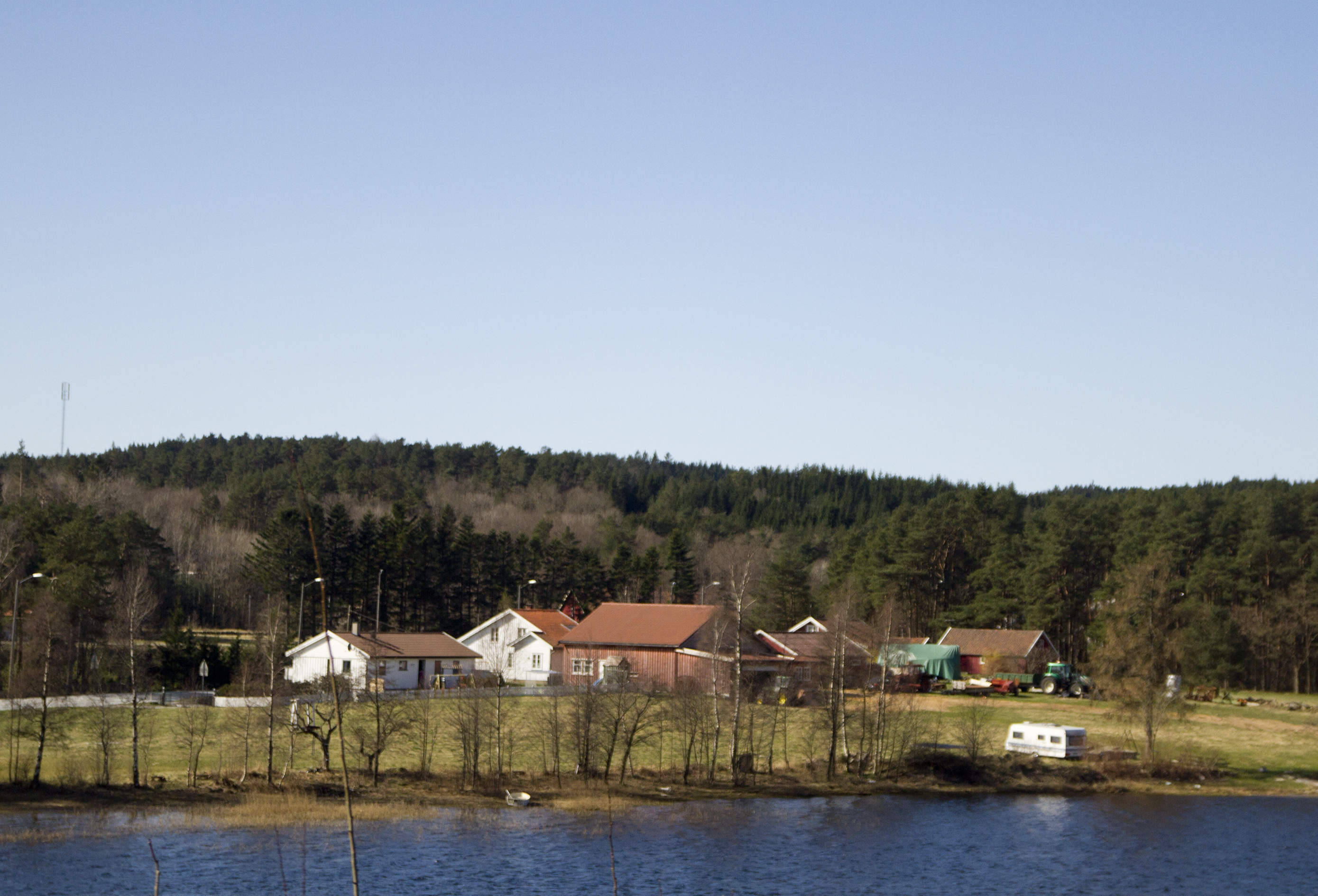 Møllebakken, Songdalen, Vest-Agder, Norway